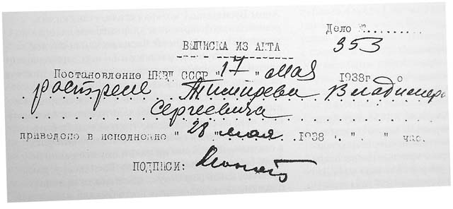 Исполнительный акт о расстеле.